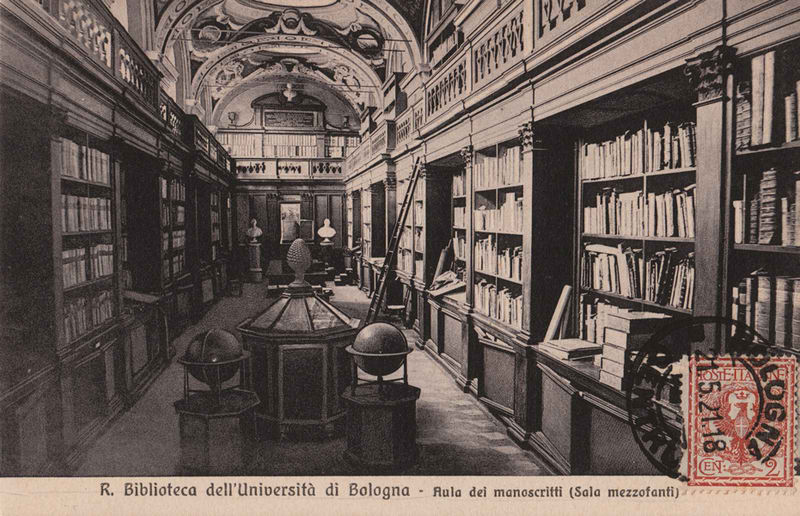 Biblioteca dell'Universita di Bologna - Italia